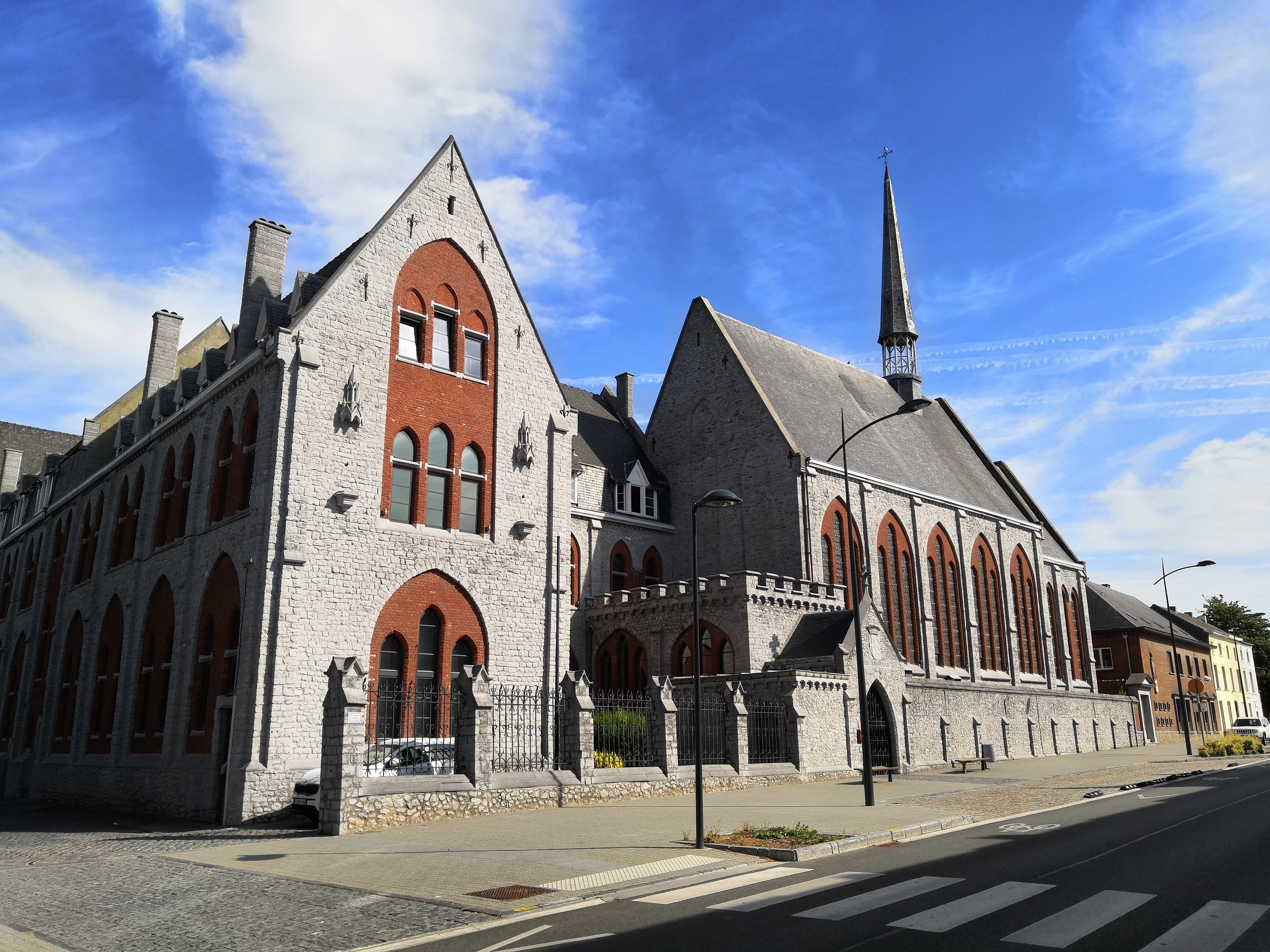 Les bâtiments du Collège Saint-Vincent (Chaussée de Braine, 22 à Soignies)